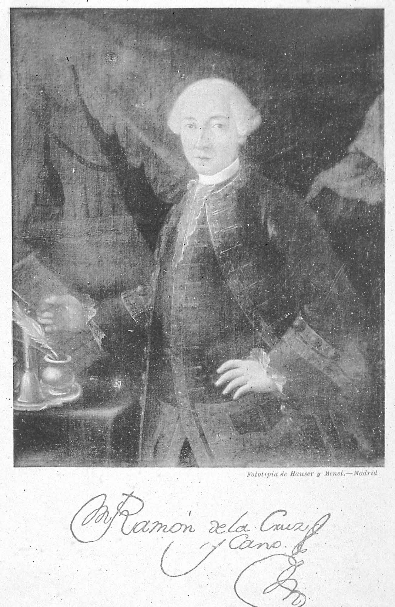 Retrato de Ramón de la Cruz Cano y Olmedilla